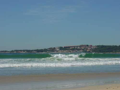 Vista de San Vicente do mar desde la Lanzada